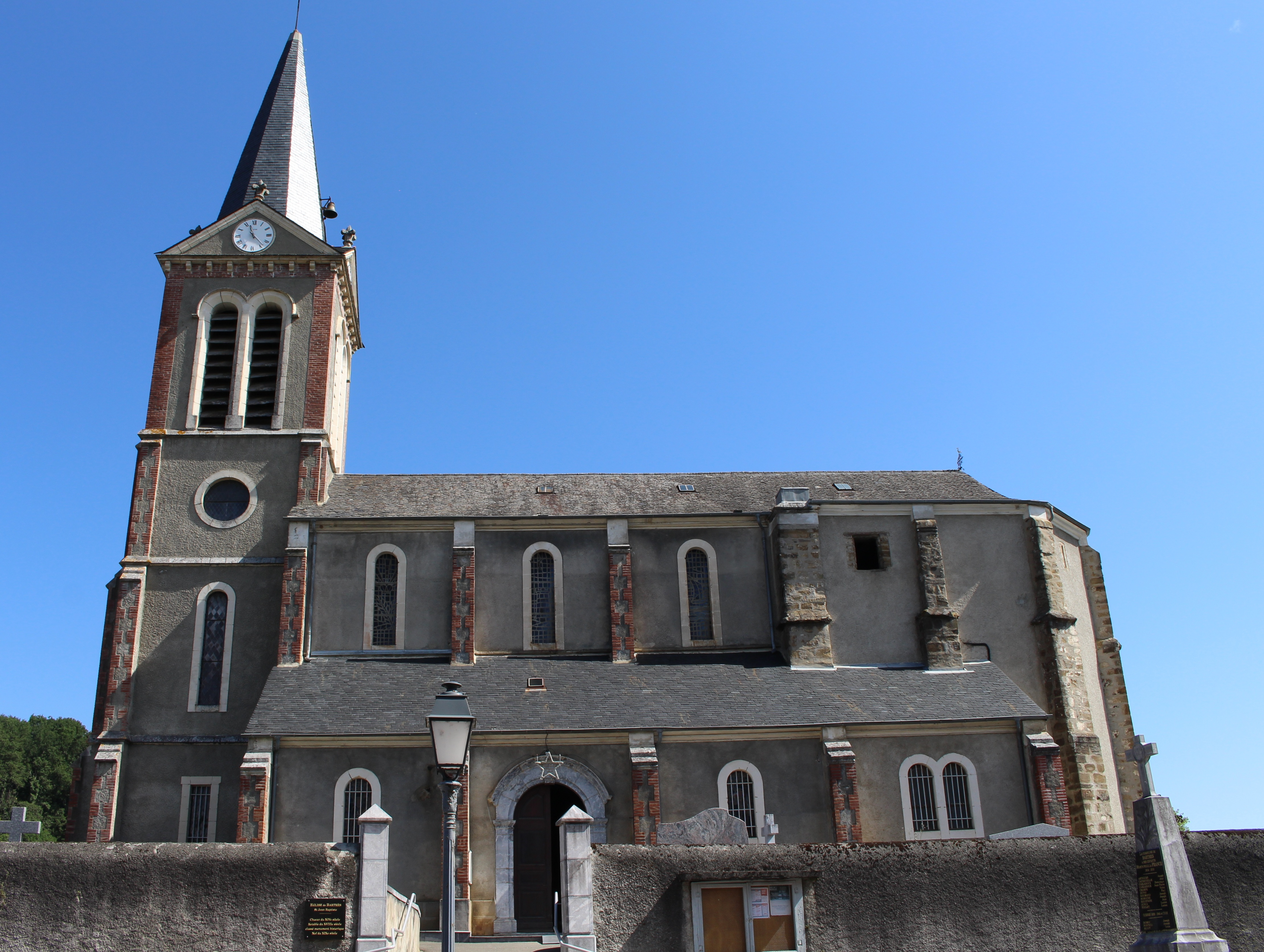 Église Saint-Jean-Baptiste de Bartrès (Hautes-Pyrénées)